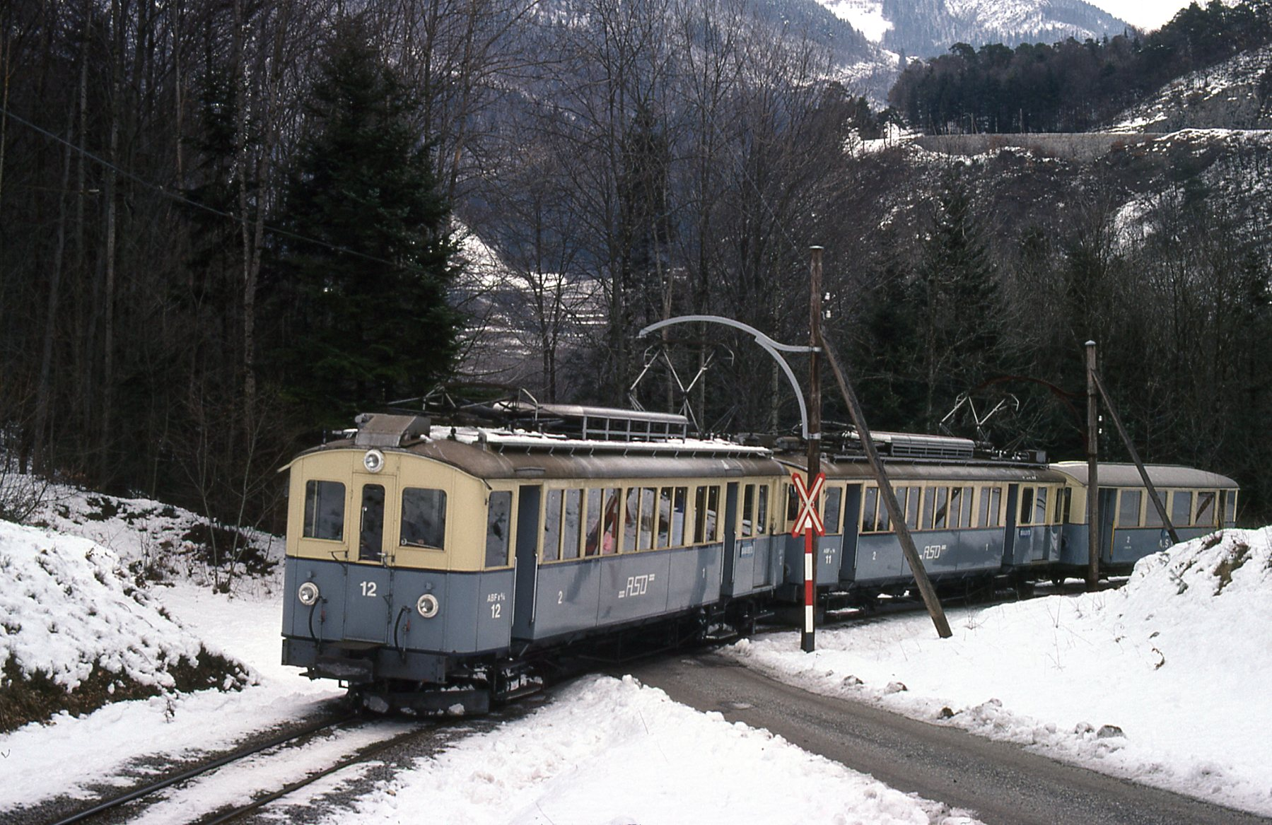 Motrices 12 et 11 dans les années 1980